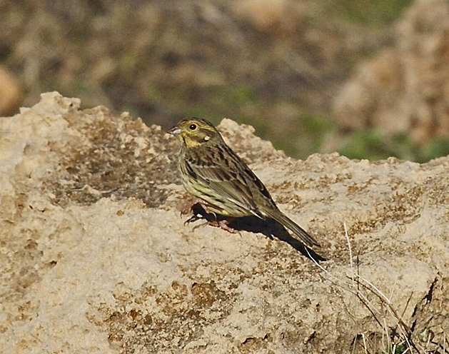 Emberiza cirlus, female